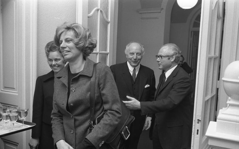 Bundespräs. Heinemann auf dem Empfang der Berliner Vertretung mit Ausstellung "Bilder aus Berliner Museen"